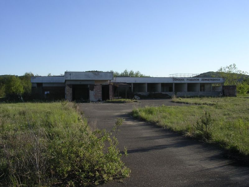 Ruiny Ośrodka Pomiarów Zewnętrznych Elektrowni Jądrowej Żarnowiec.